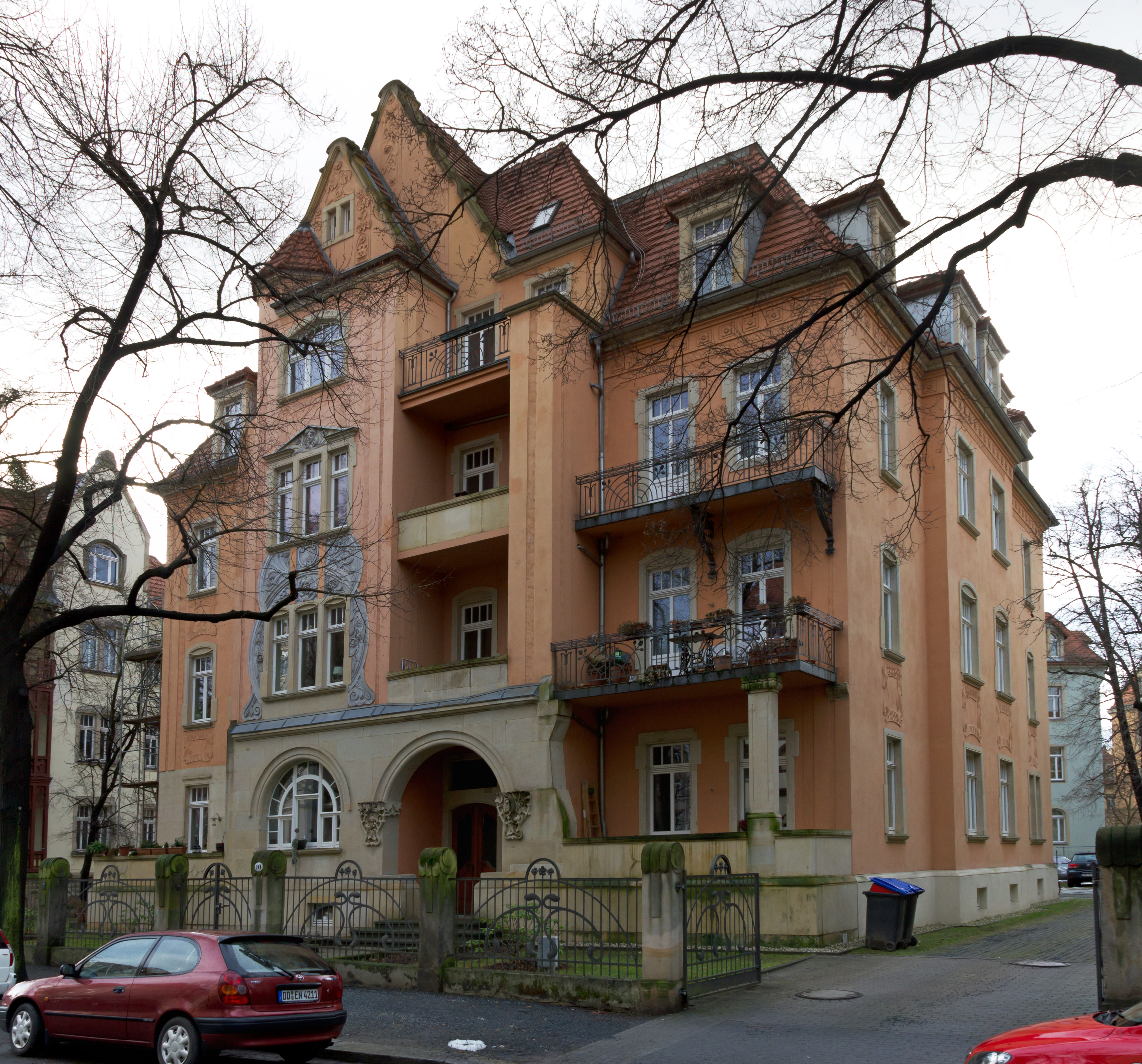 Reinickstraße 10 Dresden